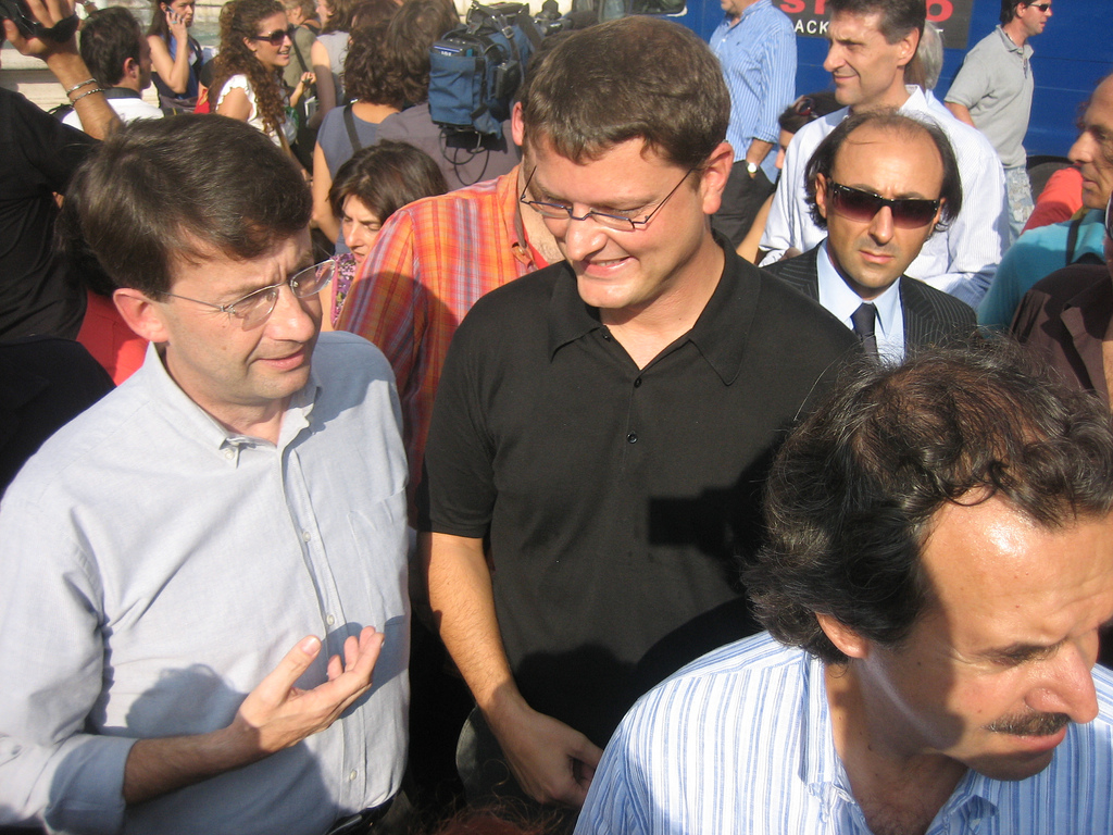 Gennaro Migliore mentre dialoga con Dario Franceschini durante la manifestazione in difesa della libertà di stampa.